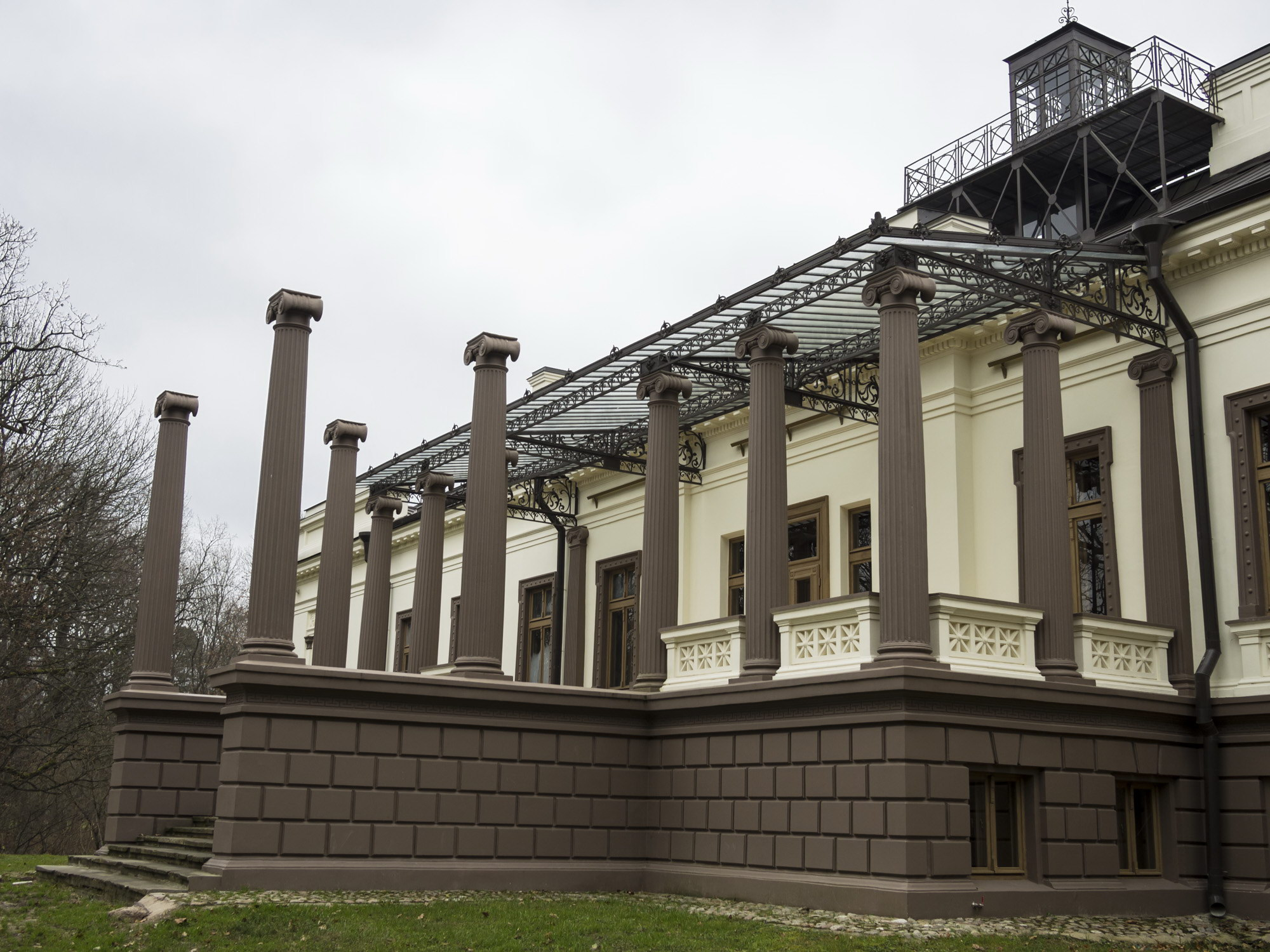 Restauruotų Gelgaudiškio dvaro rūmų kolonada